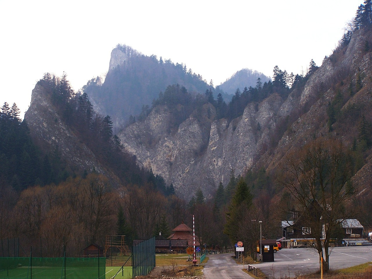 Centrum turystyczne w Leśnicy (Słowacja, Pieniny). W tle widoczne skały: Sama Jedna i Wylizana, w głębi Sokolica